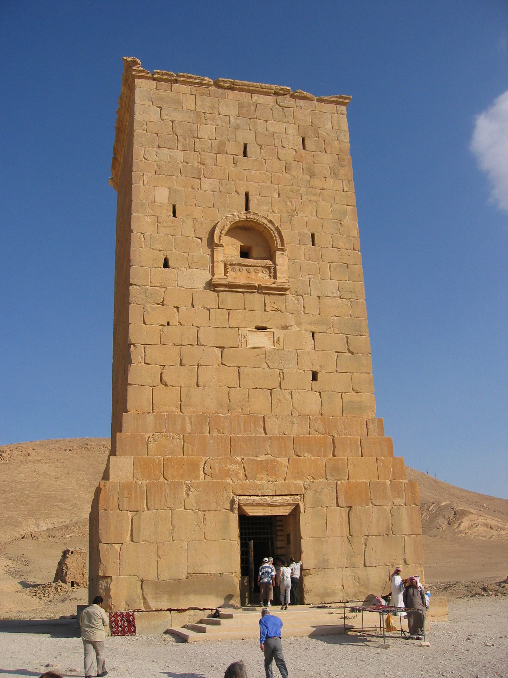 Eggelin Tomb Tower Eggelin Grabturm